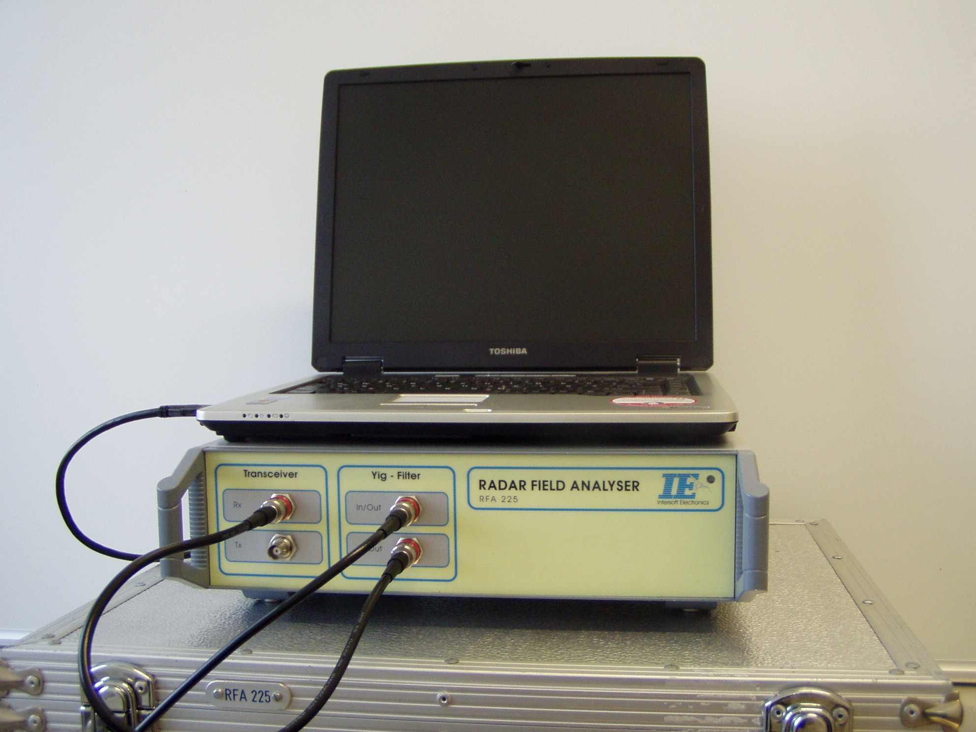 Mit dem Radarfieldanalyzer werden Daten von Radargeräten erfasst und mit dem über eine SCSI-Schnittstelle dem Laptop übergeben und dort statistisch ausgewertet.